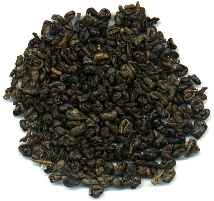 Grüner Tee, China Gunpowder, hart gerollter Kugeltee PeterW